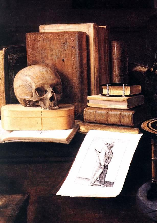 detail